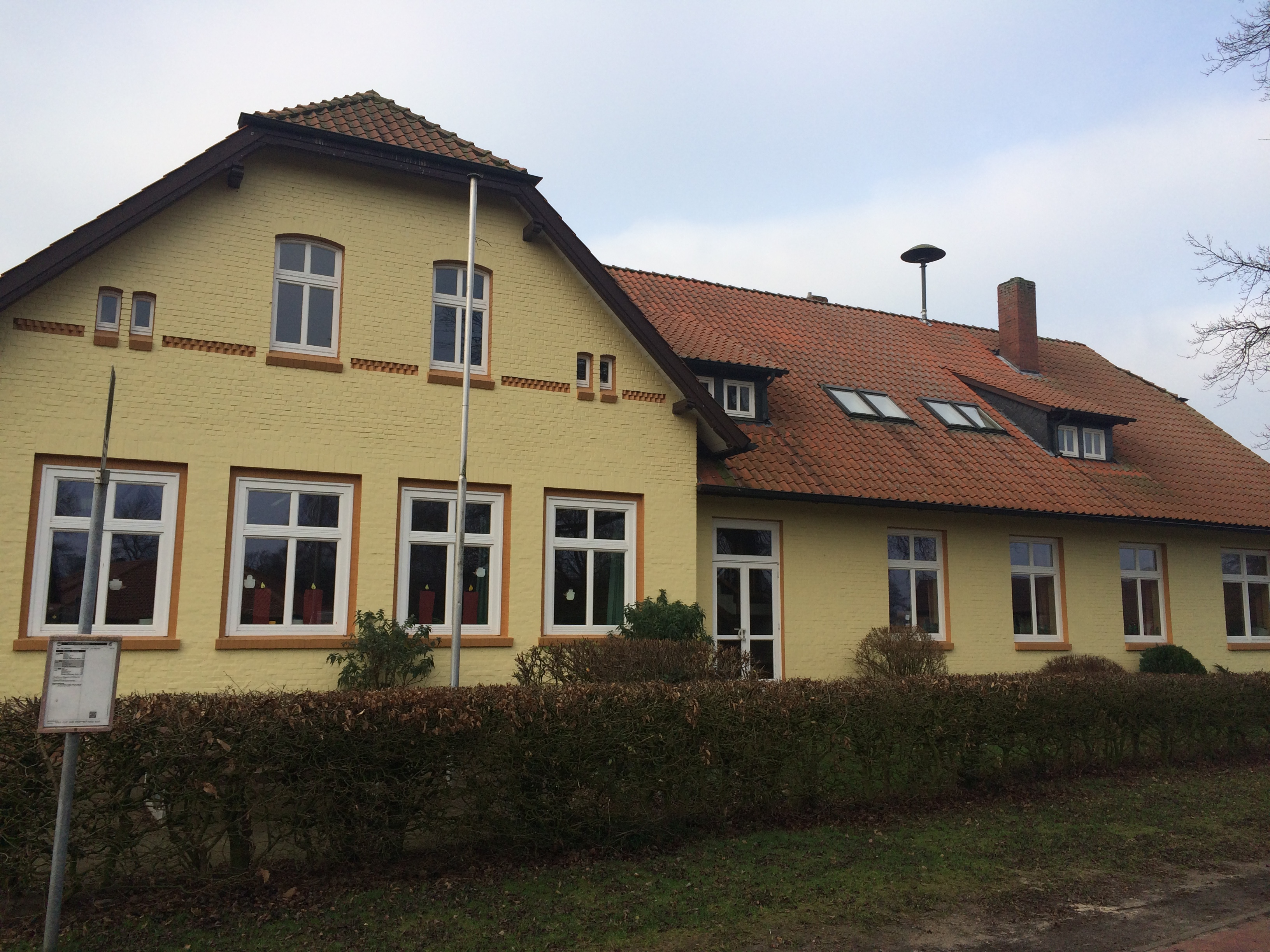 Grundschule